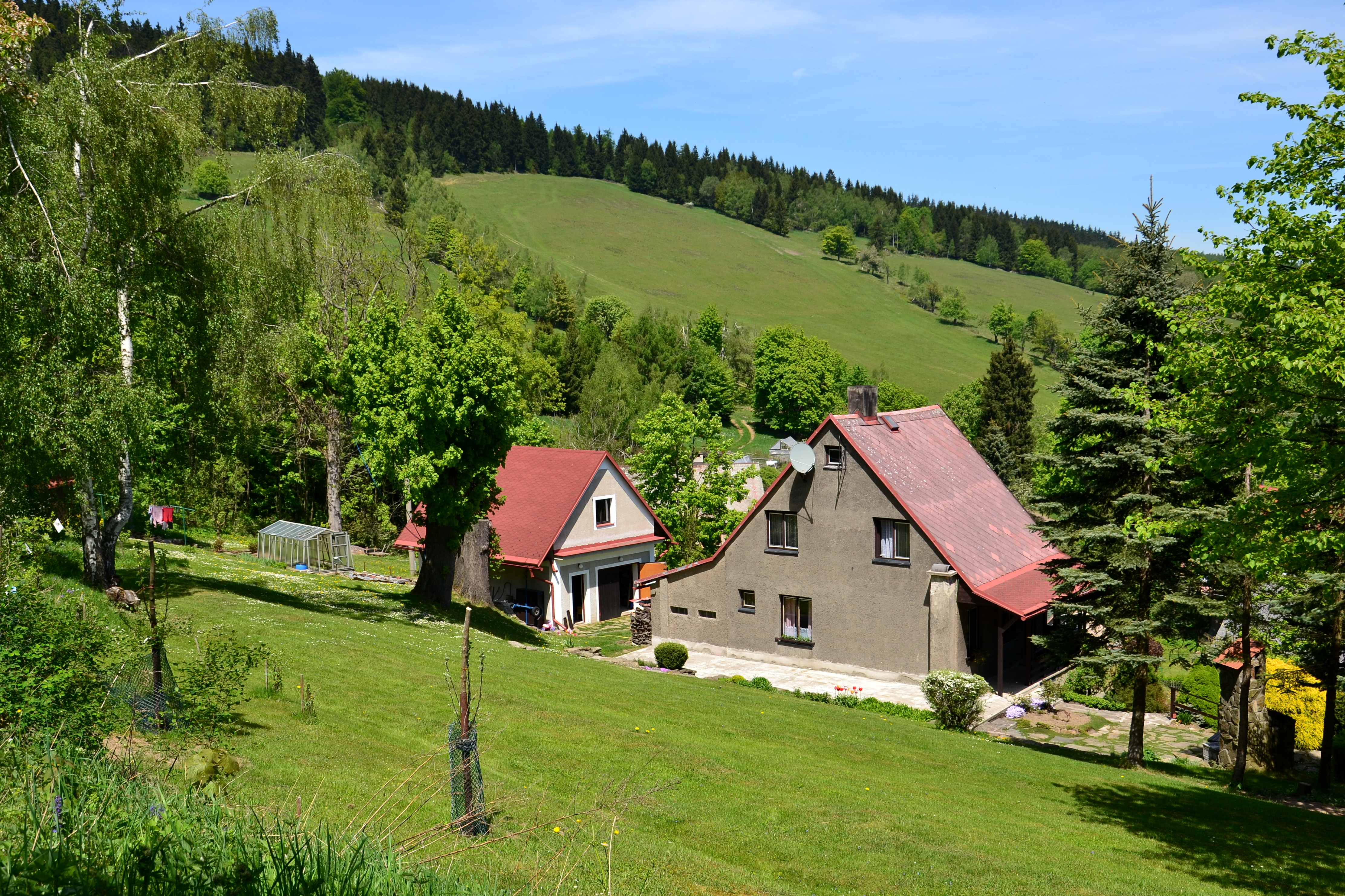 Dům v Srní